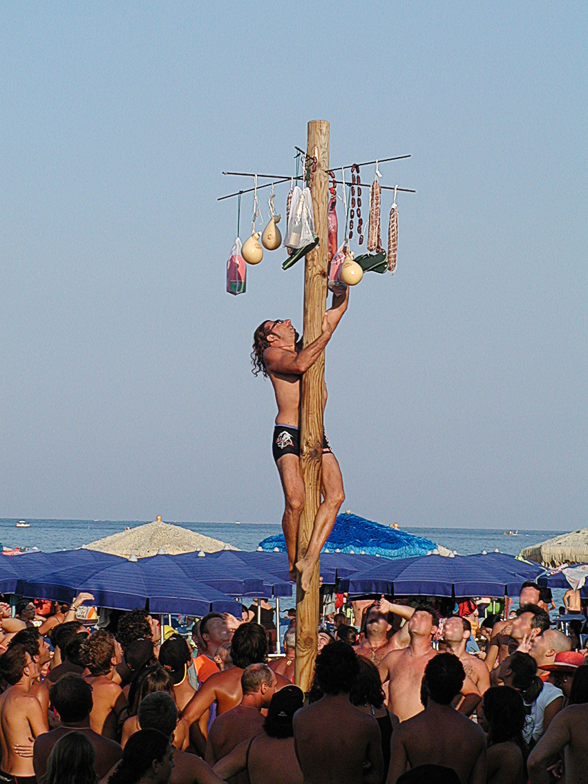 Strandspaß in Pescara am Ferragosto (von lat. Feriae Augusti = Festtag des Augustus), er gilt als einer der wichtigsten kirchlichen und familiären Feiertage Italiens.